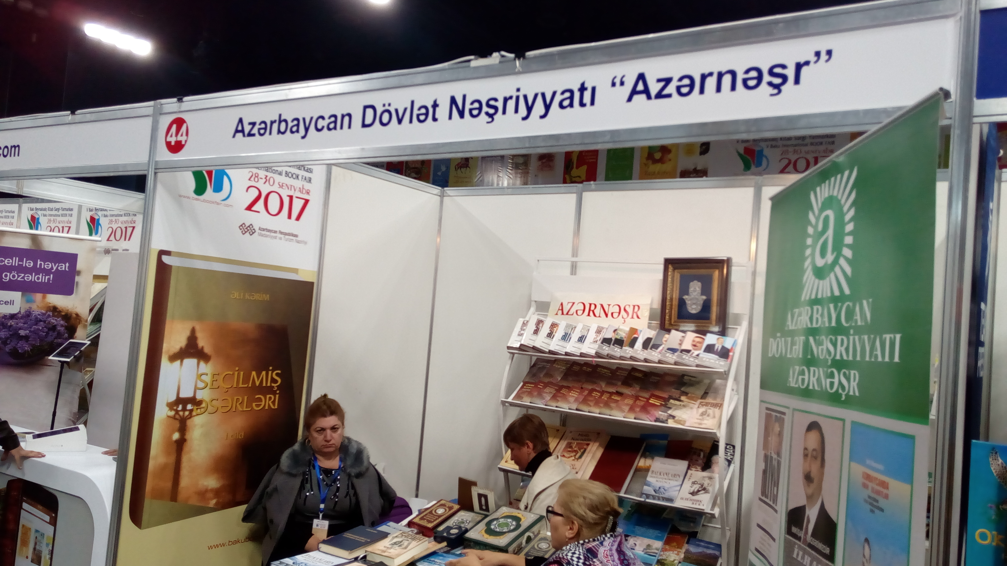 V Bakı Beynəlxalq Kitab Sərgi-Yarmarkası